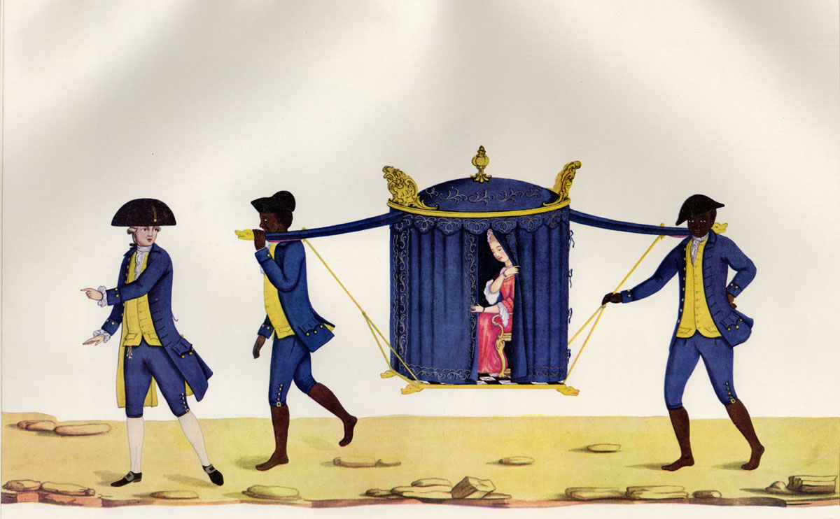 Carrying a Sedan Chair (Palanquin), Rio de Janeiro, Brazil, ca. 1770s